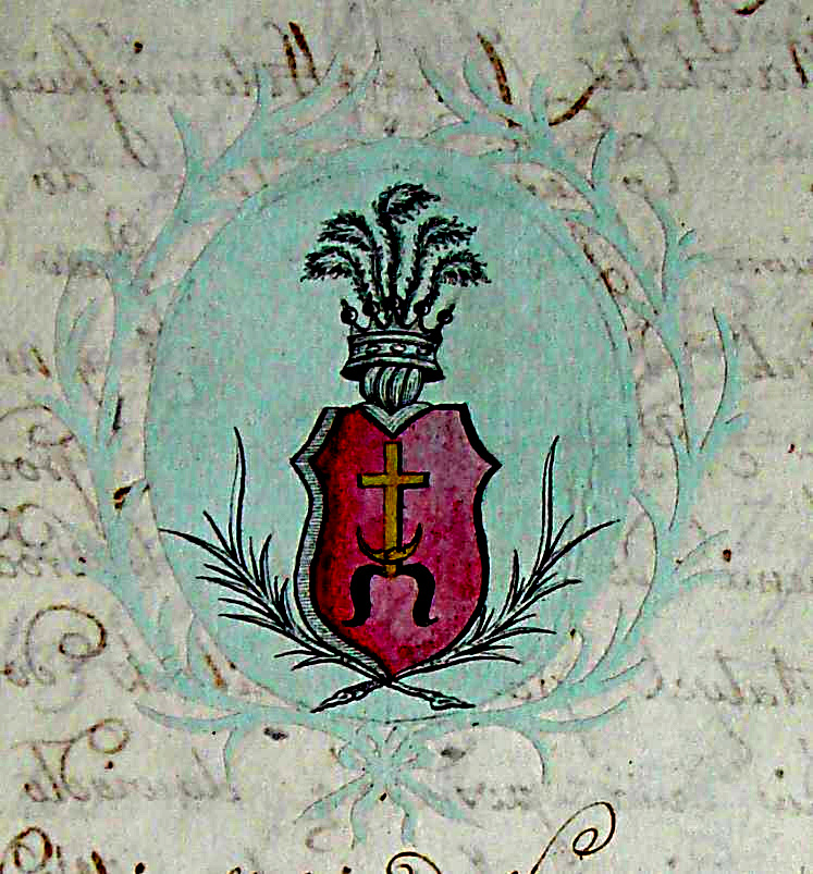 Herb Kostrowiec Odmienny używany przez Hołowińskich. Z teki rodzinnej Hołowińskich